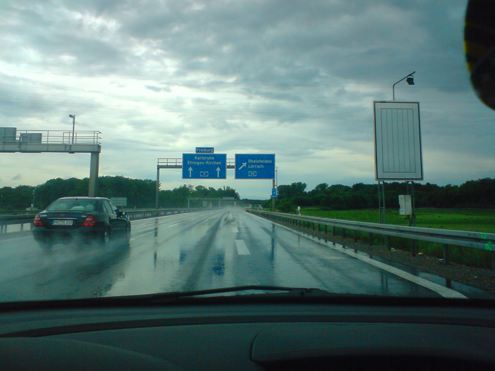 Panneau autoroutier allemand près de Weil-am-Rhein